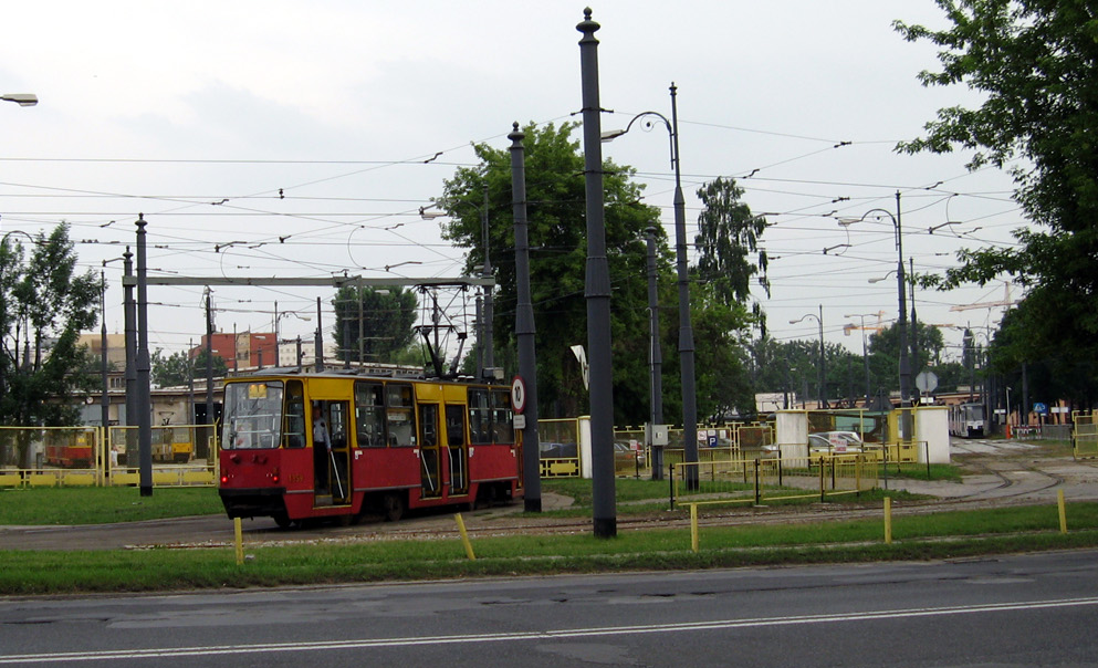 Zajezdnia tramwajowa na Woronicza w Warszawie. Widok od ulicy Woronicza.